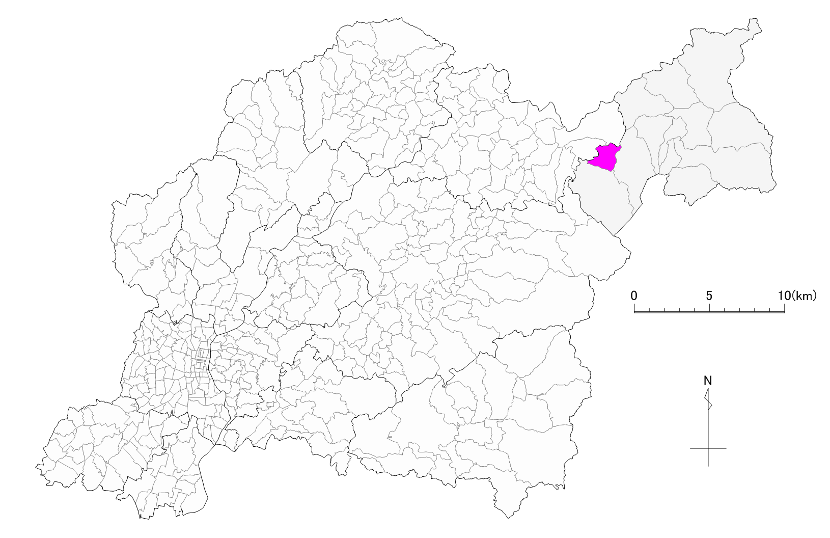 豊田市富永町位置図